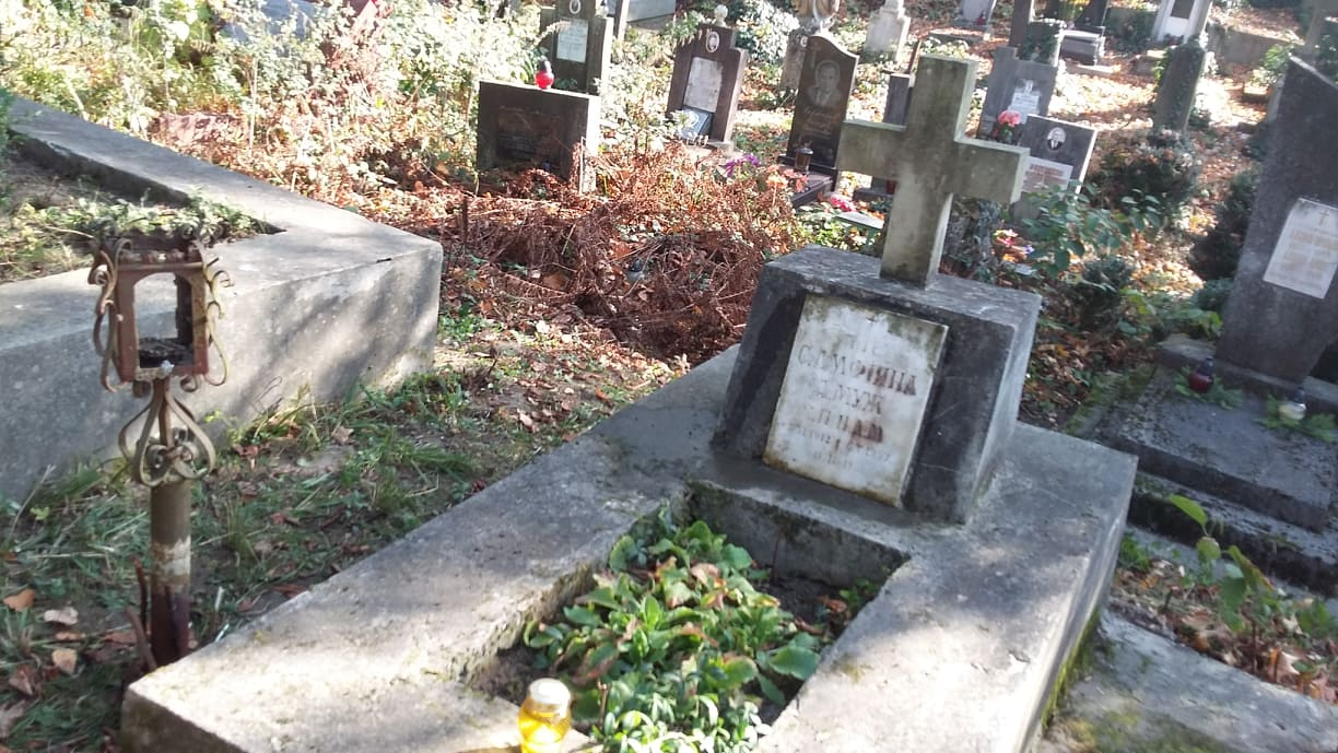 Поховання сестри-служебниці Амфіяни Амуж